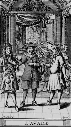 L'Avare, Frontispice de l'édition de 1682 par Pierre Brissart, gravure par J. Sauvé.